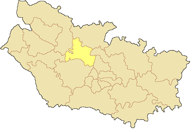 Canton de Flixecourt dans le département de la Somme